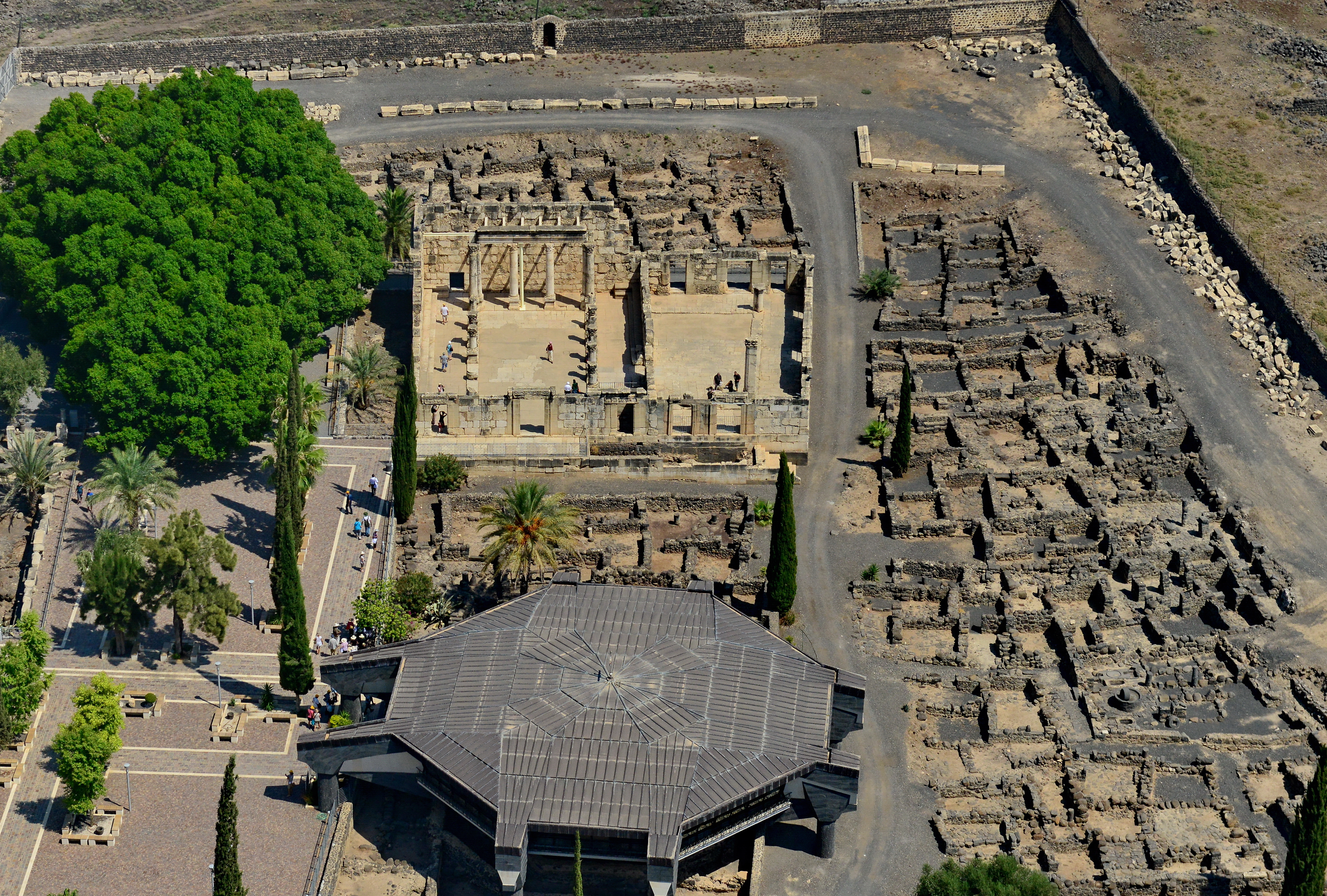 כפר נחום היה יישוב בחופה הצפוני של הכנרת, לא הרחק מכורזים, בבקעת עין שבע. כיום האתר הוא גן לאומי המשתרע על-פני שטח של 80 דונם.